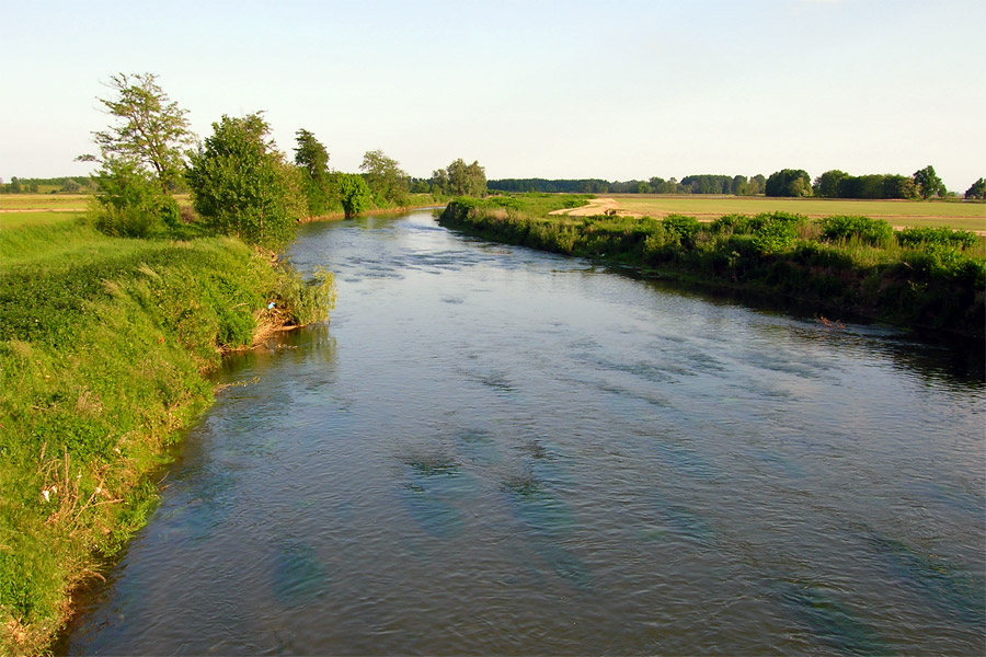 Il torrente Agogna a sud di Novara, nei pressi della cascina San Maiolo